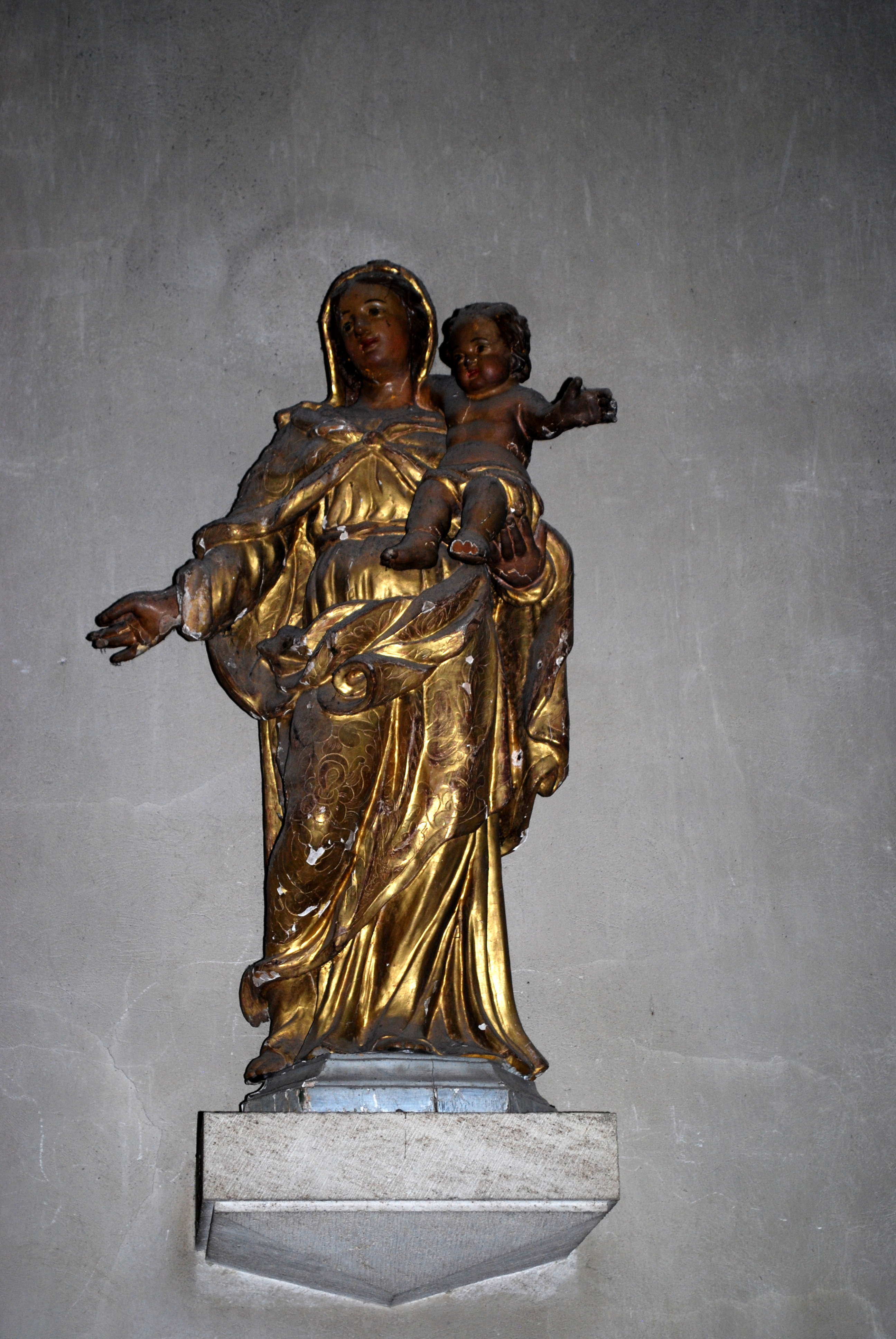 Villenave d'Ornon église